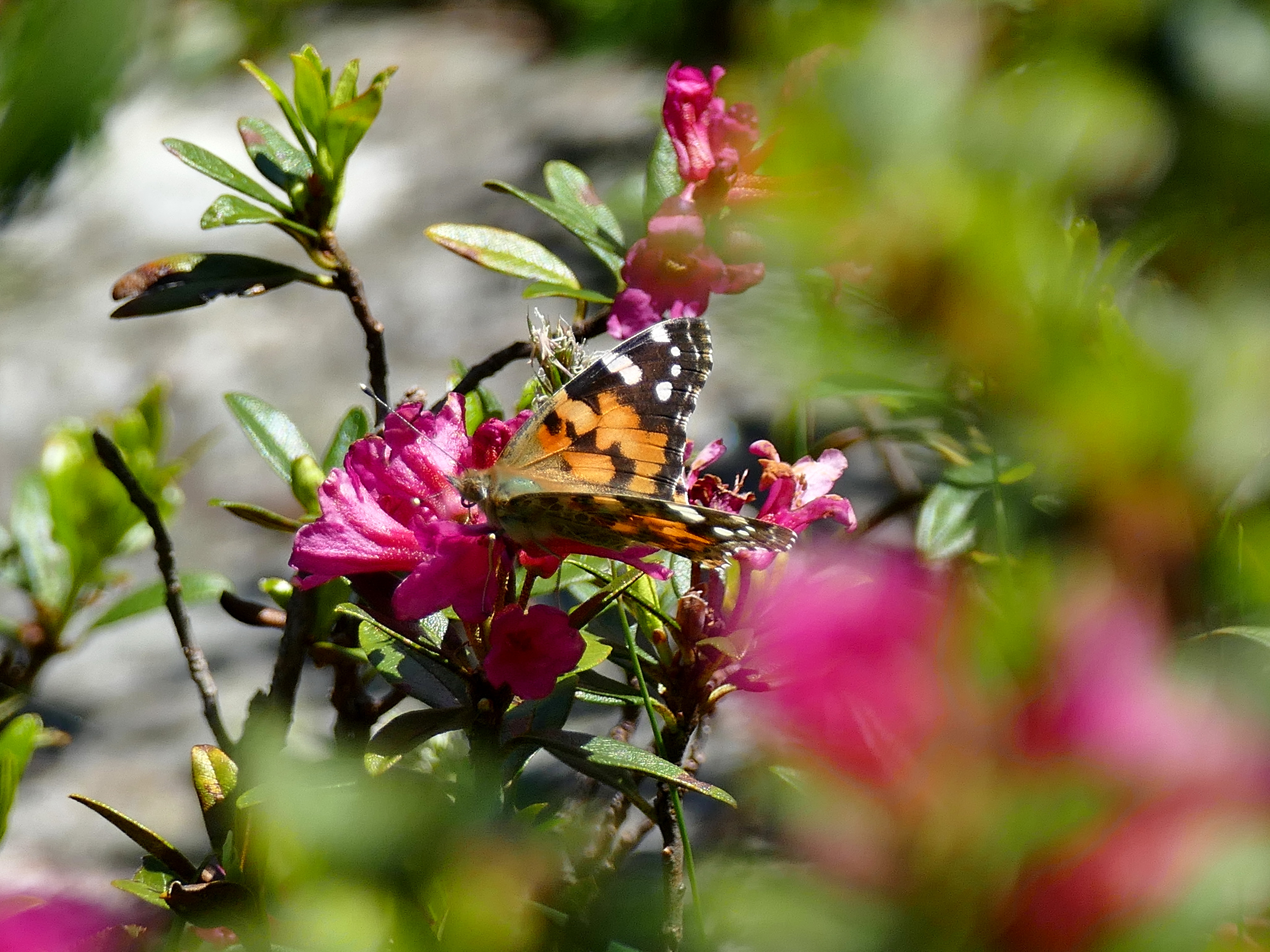 Parco naturale Gruppo di Tessa (Q1970690) Valle di Plan Vanessa del cardo (Vanessa cardui), rododendro ferrugineo (Rhododendron ferrugineum)